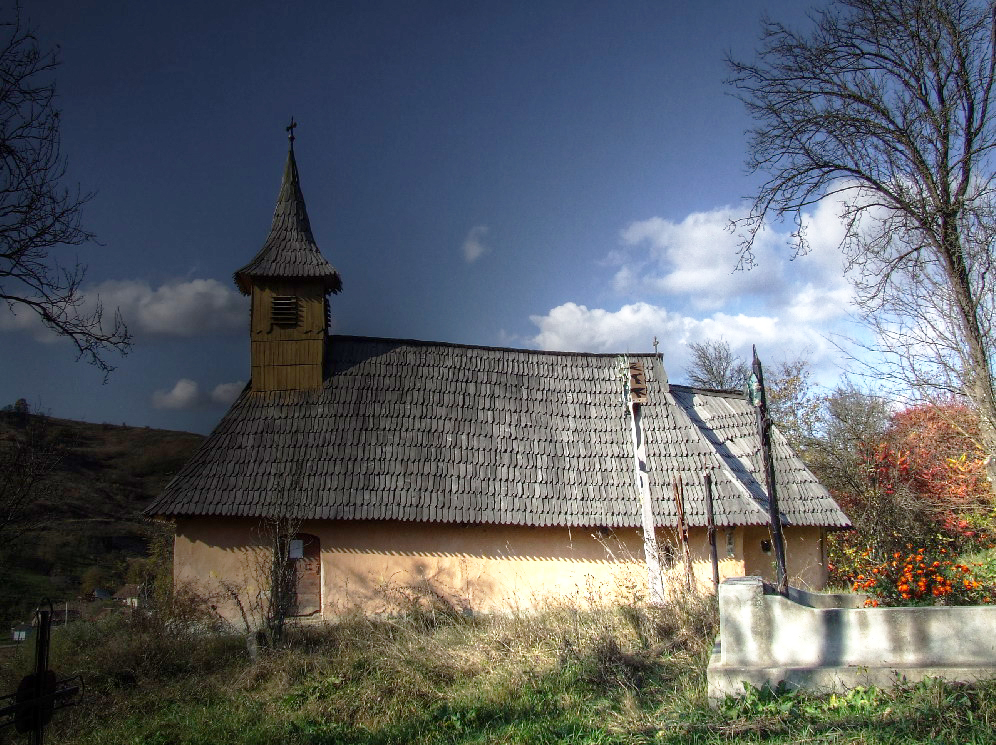 Biserica de lemn din Târguşor (Biserici de lemn din Cluj)